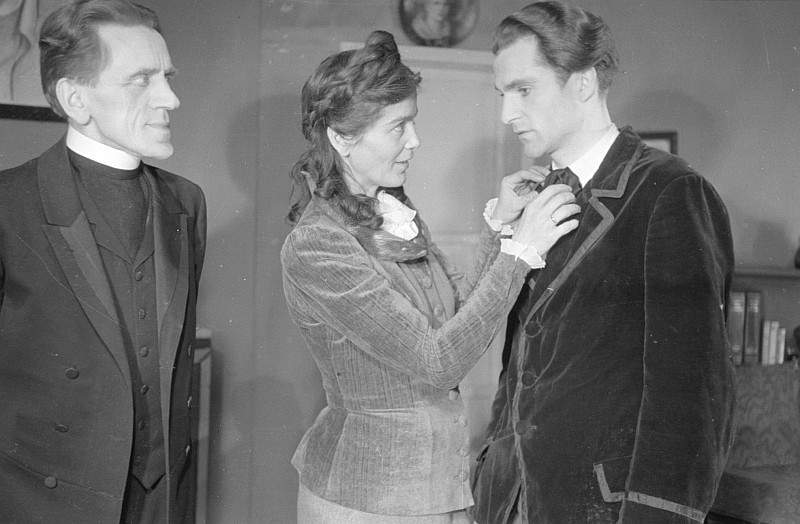 Original image description from the Deutsche Fotothek Szenenbilder